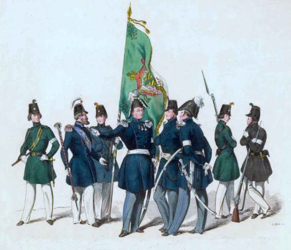 Leipziger Kommunalgarde. Mitglieder verschiedener Kompanien und unterschiedlicher Chargen vor der Fahne der Leipziger Kommunalgarde.